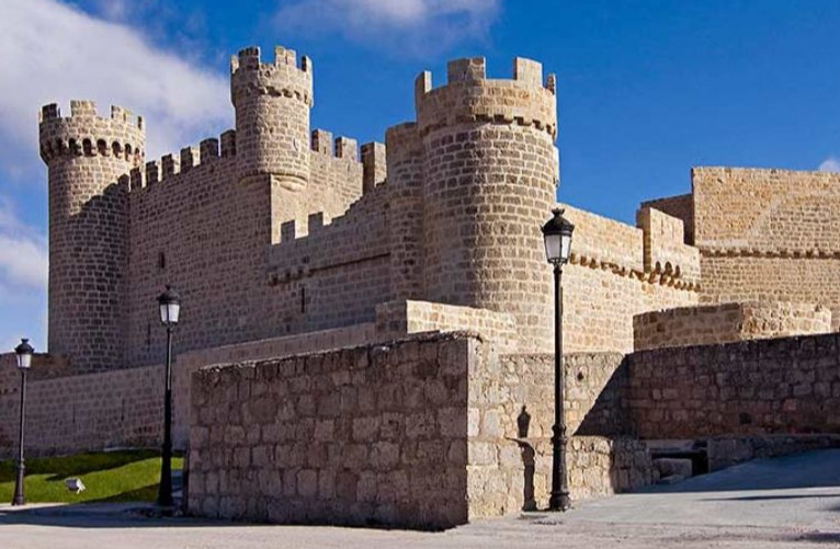 CastilloFlordeLis2